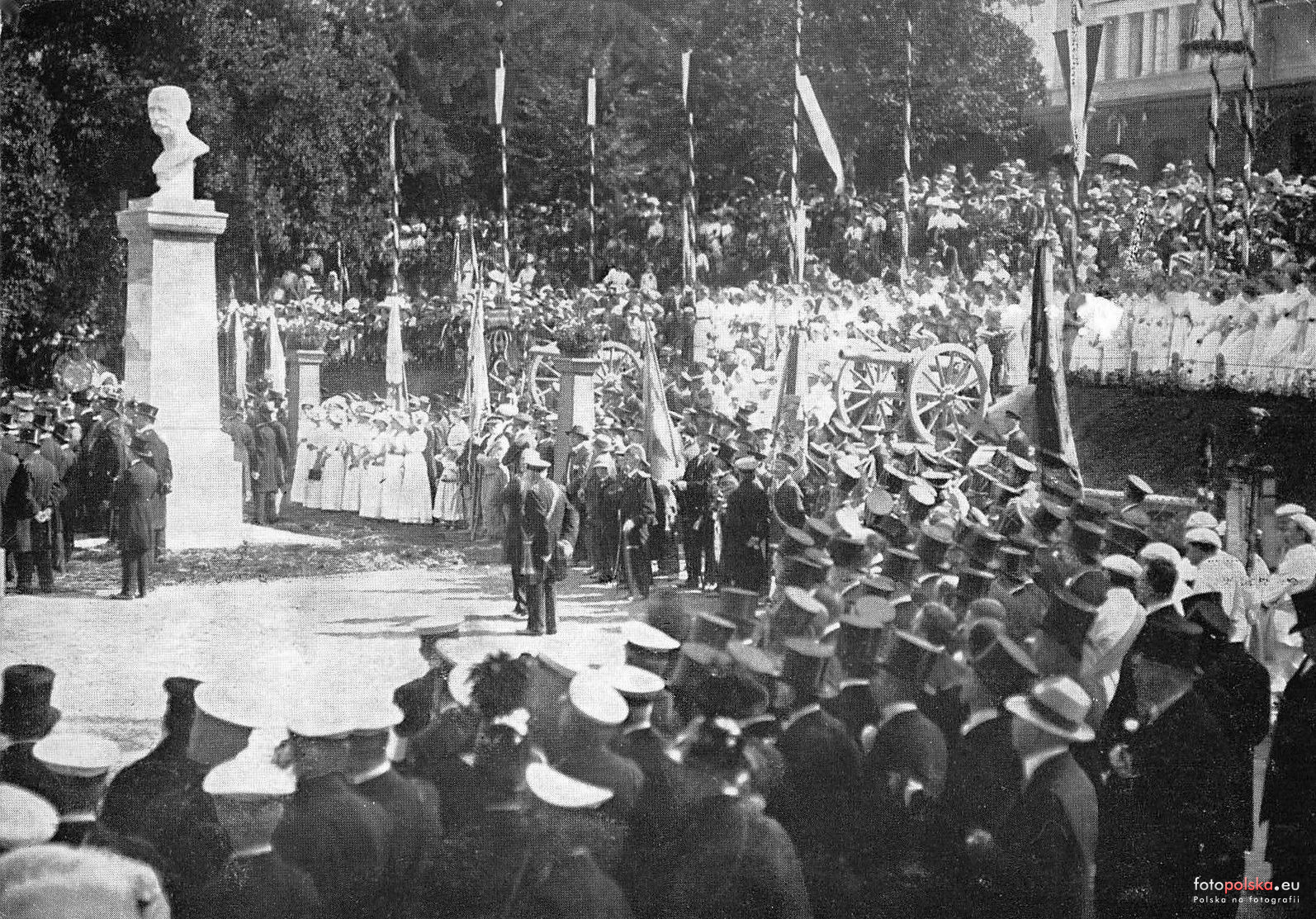 Pomnik Gebharda Leberechta von Bluchera